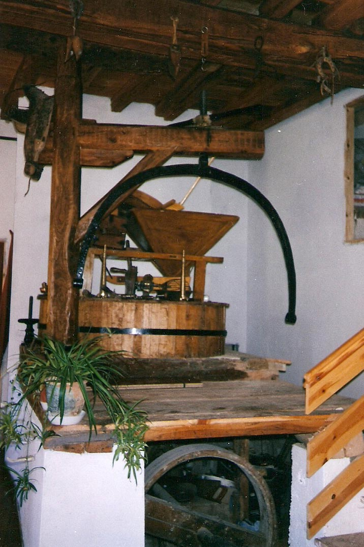 Antigua maquinaria de uno de los molinos de Quintanarraya (Burgos, España).